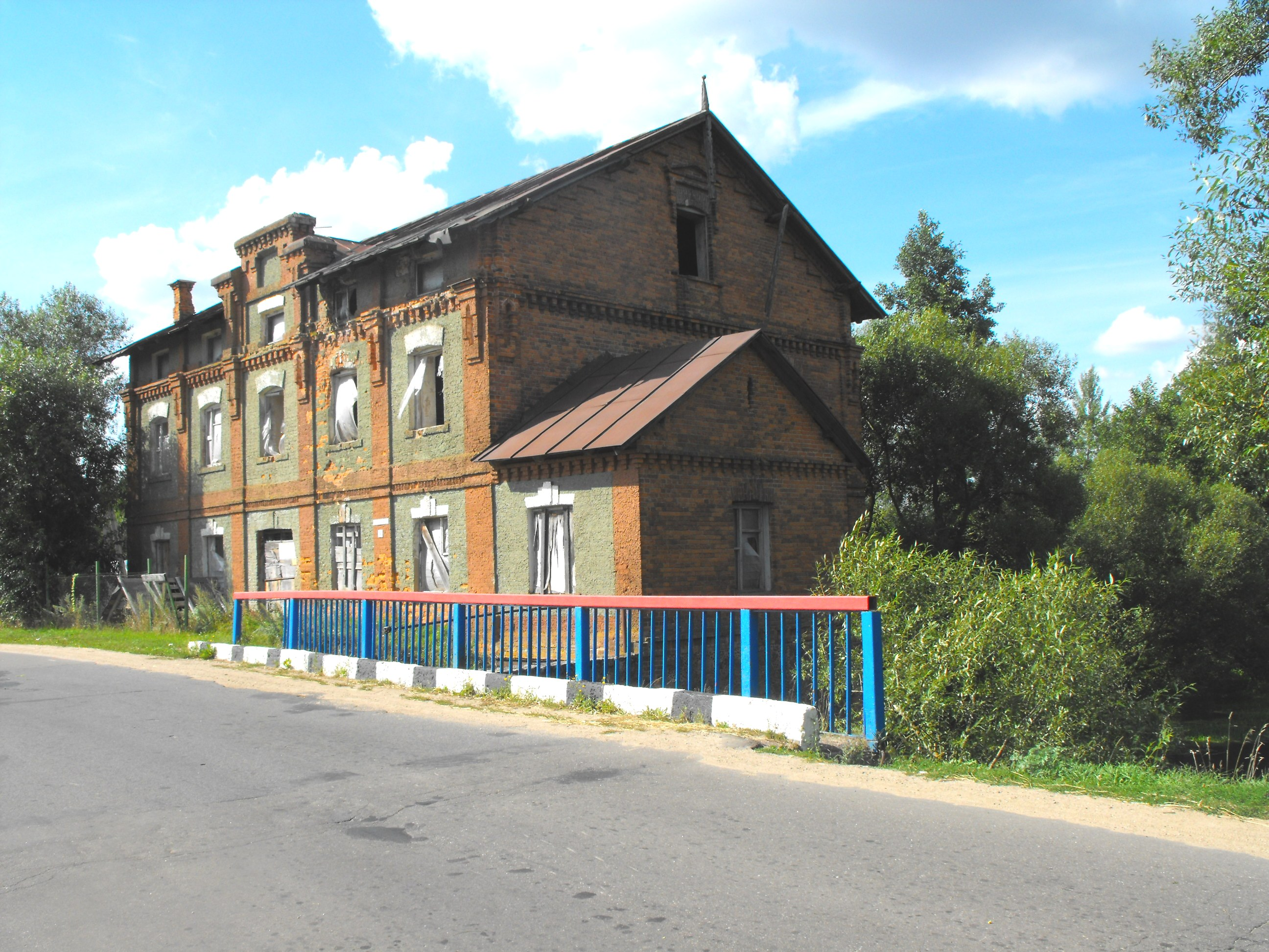 Деревня Городок, Молодечненский район. Август 2012 года.